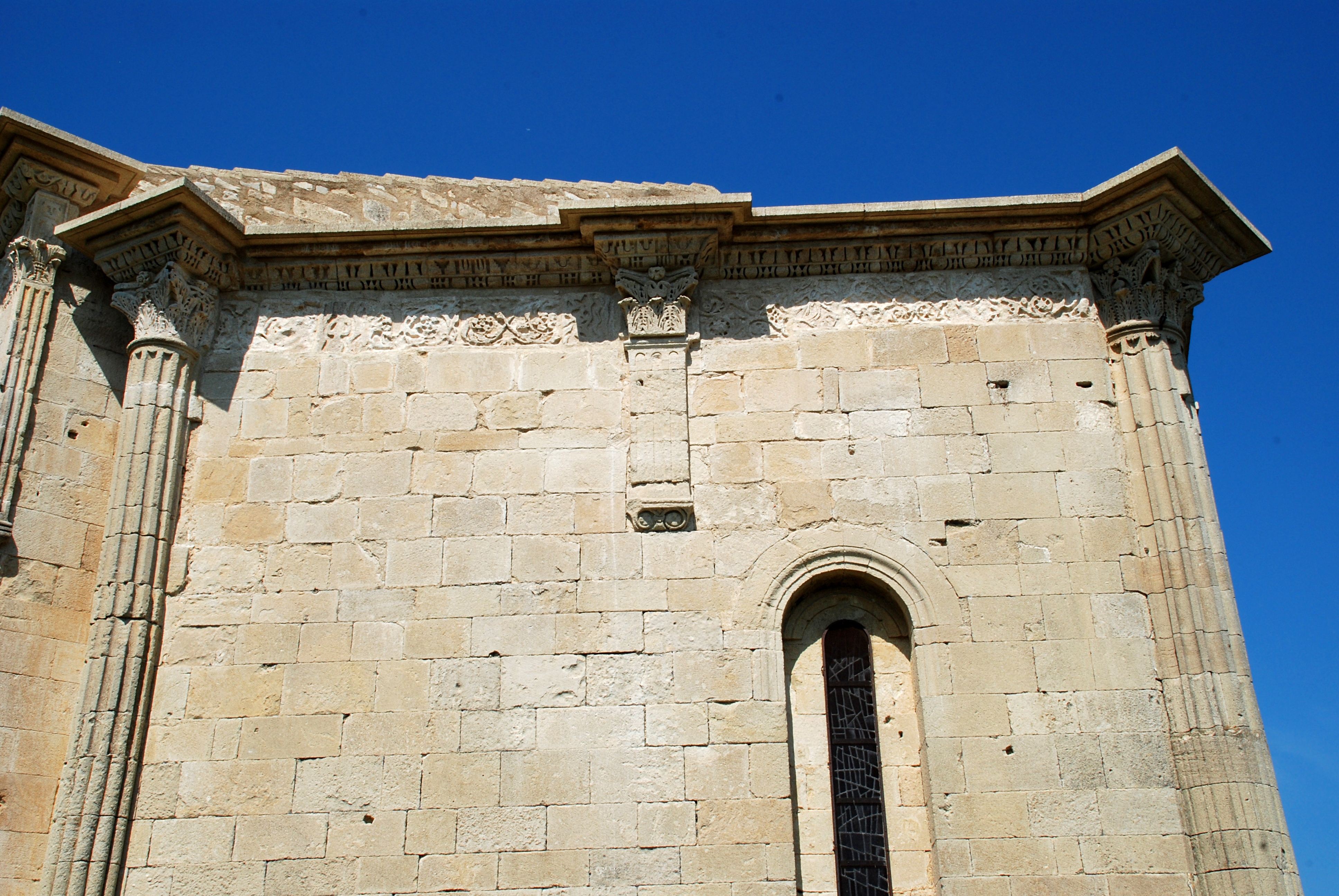 France - Provence - Vaucluse - Vaison-la-romaine - chapelle Saint-Quenin (art roman provençal) : décoration à l'antique du chevet